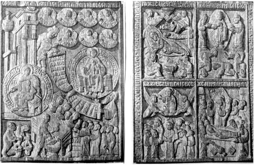 Прамудрасць ствары сабе храм і Святы. Рускі музей